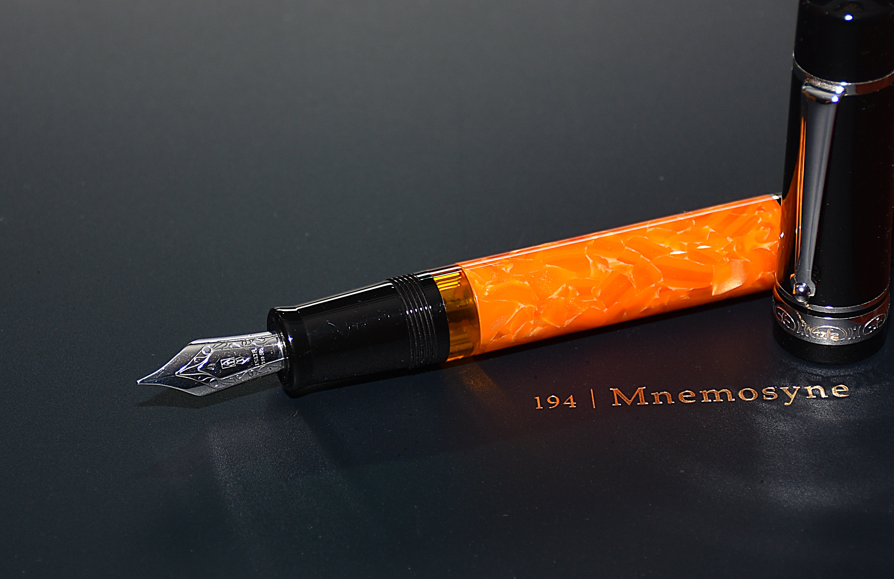 Fine Italian Pen!